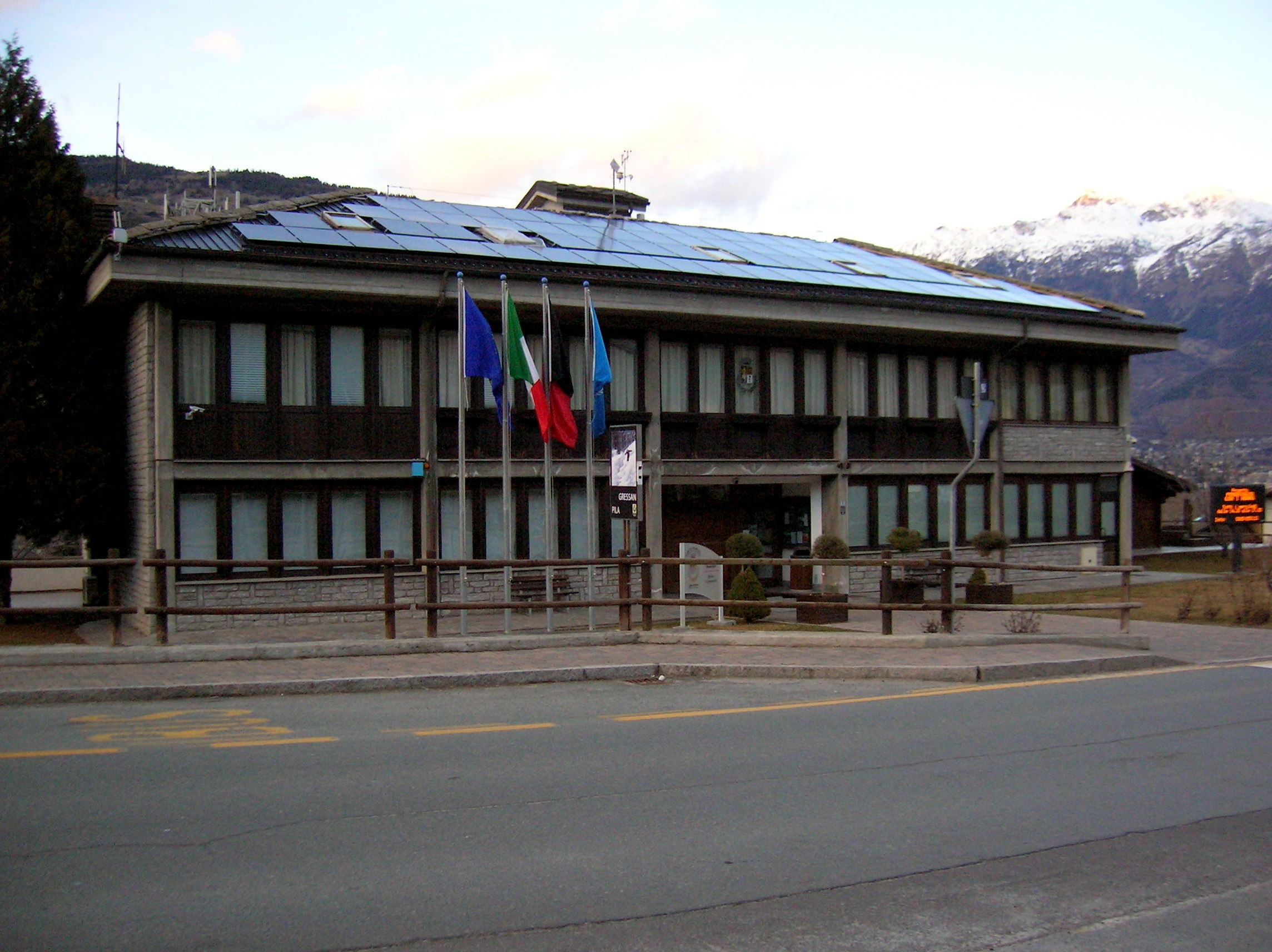 Municipio di Gressan, Valle d'Aosta, Italia.